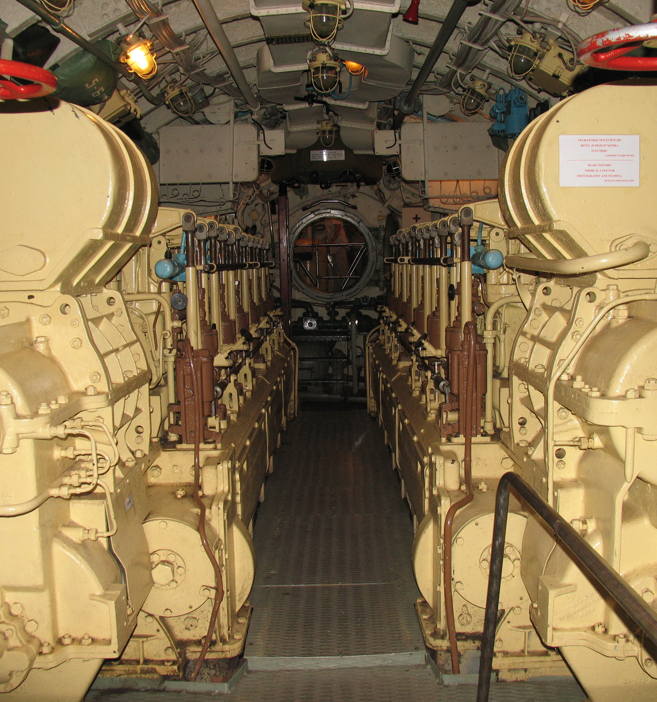 Подводная лодка Д-2 «Народоволец». Шестой (моторный) отсек. Дизели. Вид в сторону носа.